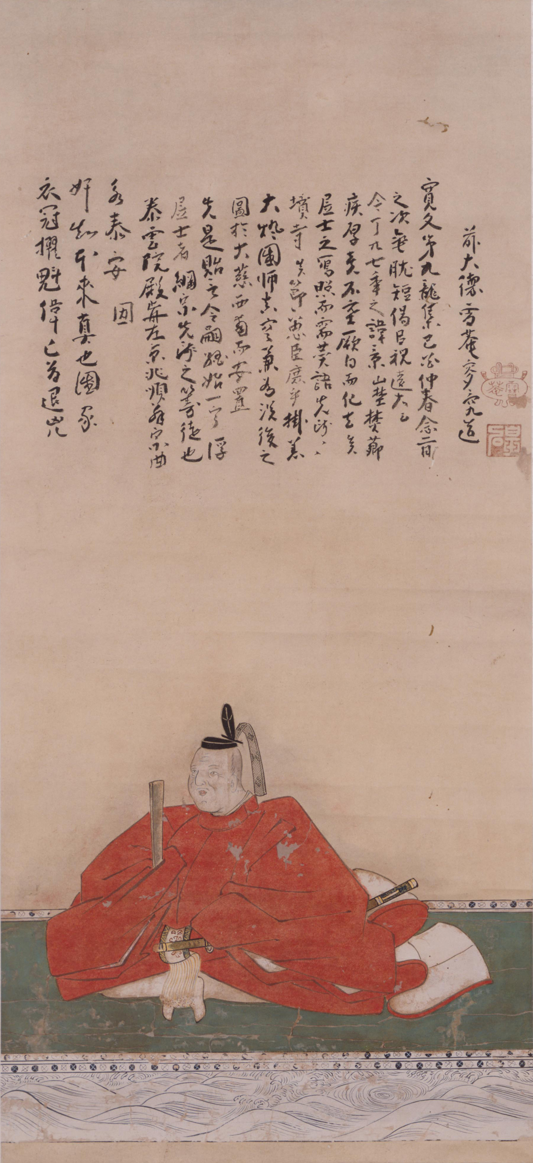 分部光信の肖像。